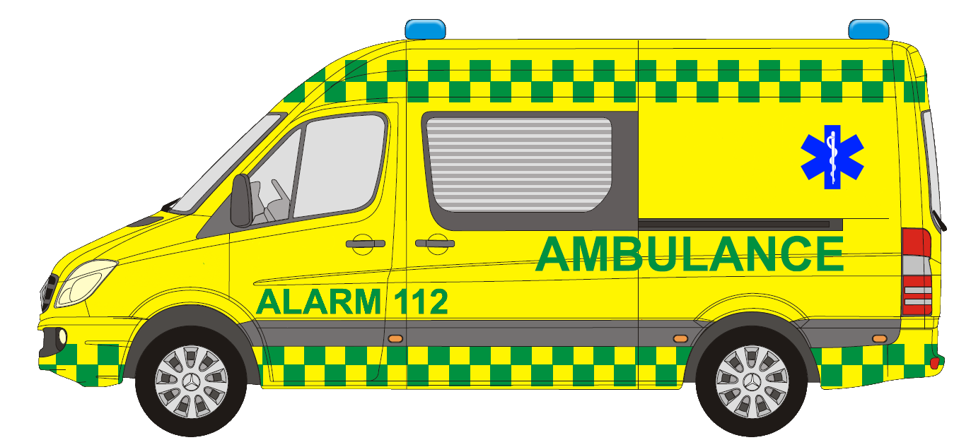 Ambulance Neutral